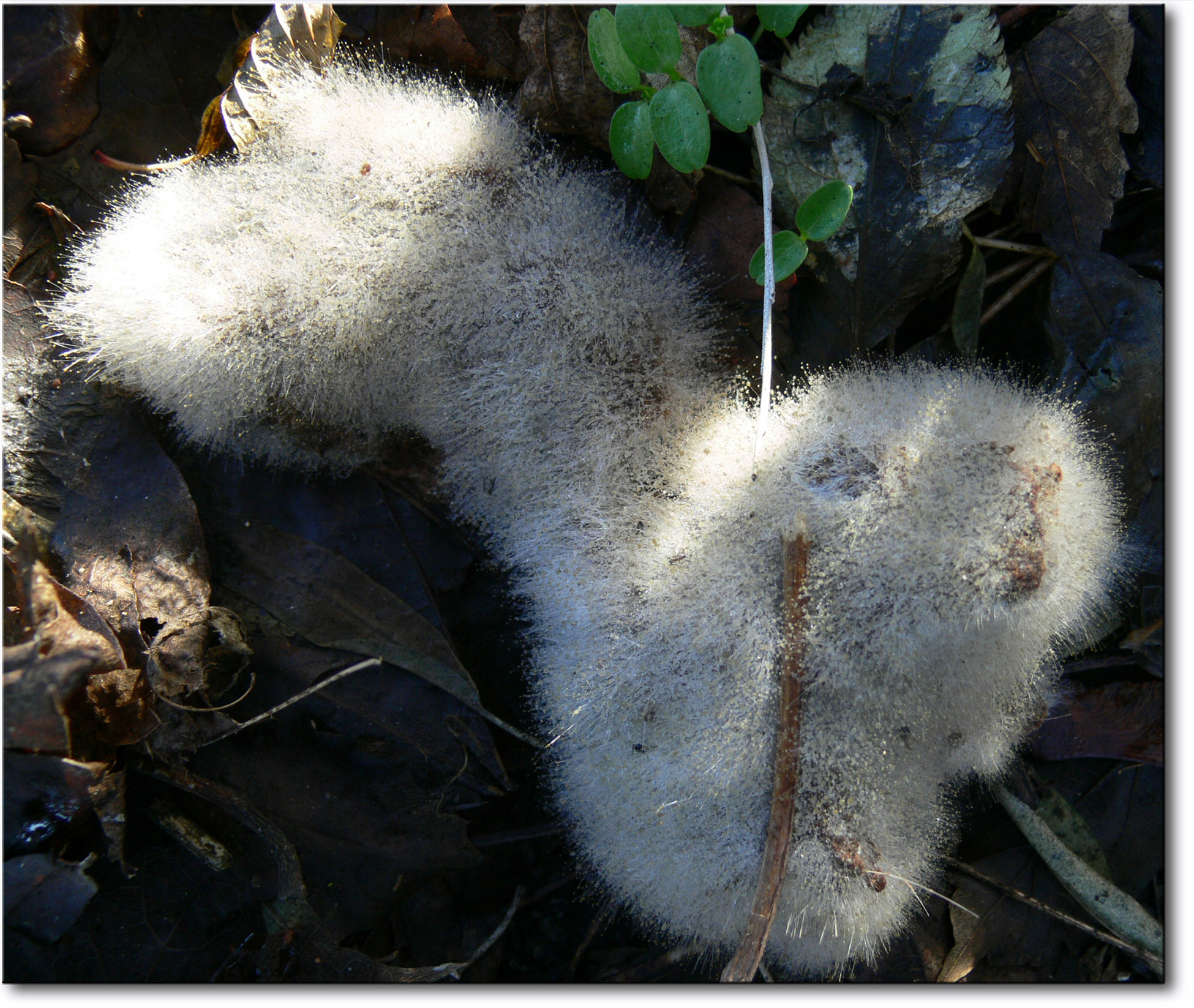 Les excréments animaux (ici, de chien) se décomposent bien plus vite lorsque présents dans un contexte permettant leur colonisation par des insectes coprophages et/ou des bactéries ou champignons (en hiver, en zone tempérée, sur la photo prise dans le Nord de la France, en ville). une certaine hygrométrie-température, le jour et/ou la nuit est une condition nécessaire pour la colonisation de la matière organique par les champignons.